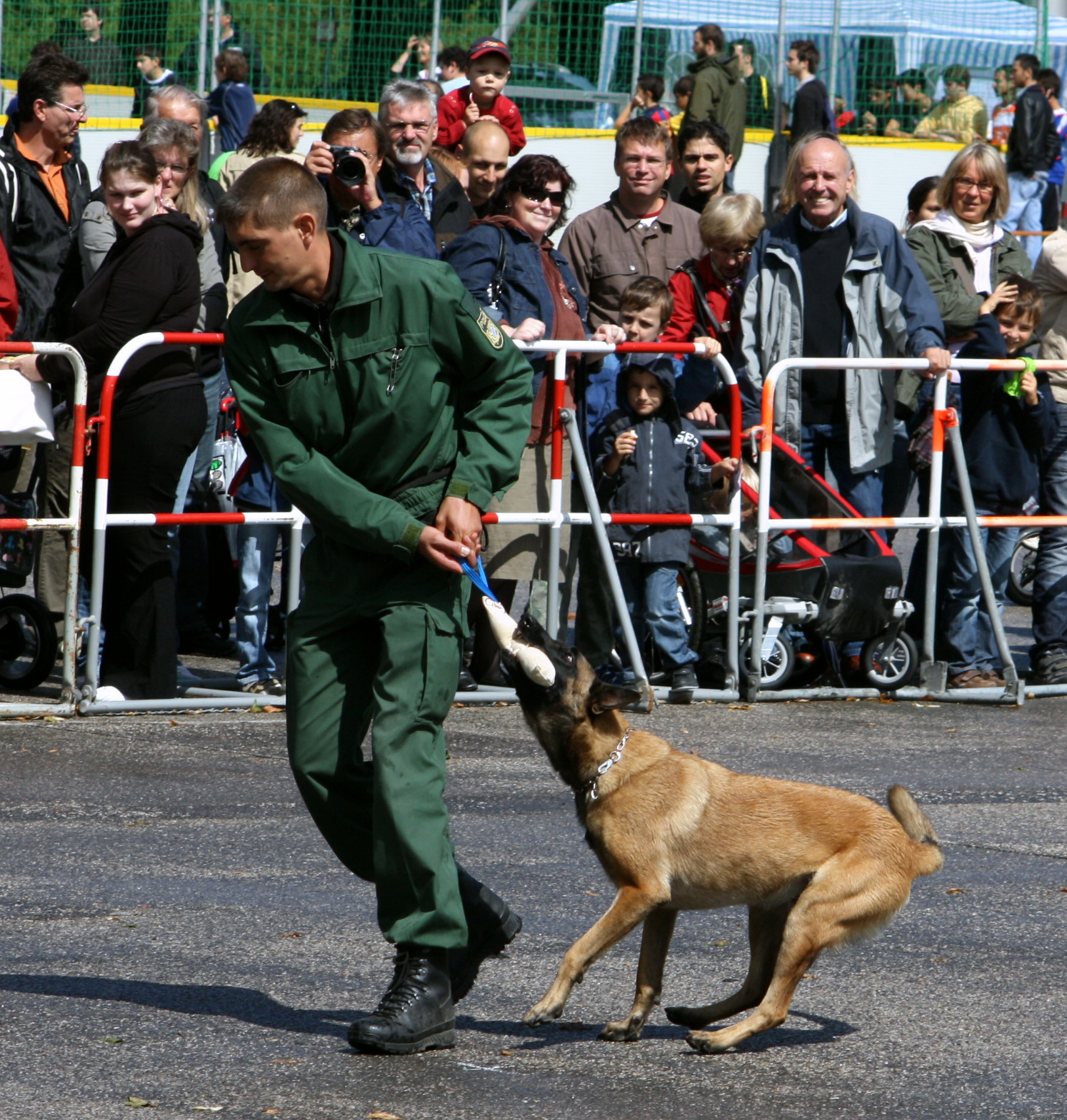 Belgischer Schäferhund in der Verwendung als Polizeihund bei der bayerischen Polizei. Vorführung am Tag der Courage im Olympiapark München.